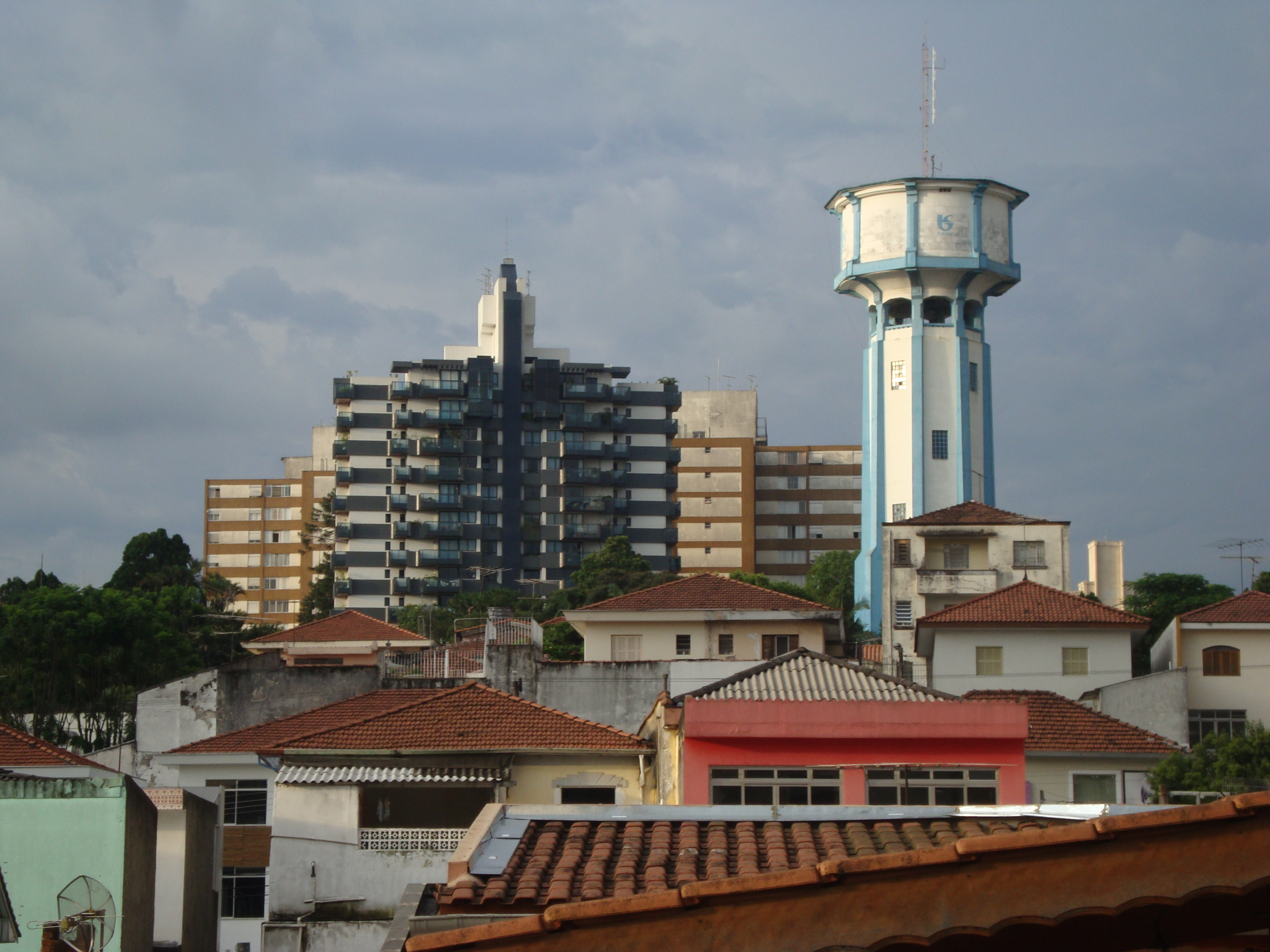 Panorama da região do alto do bairro de Santana - São Paulo - SP Por Pedro Luiz R.